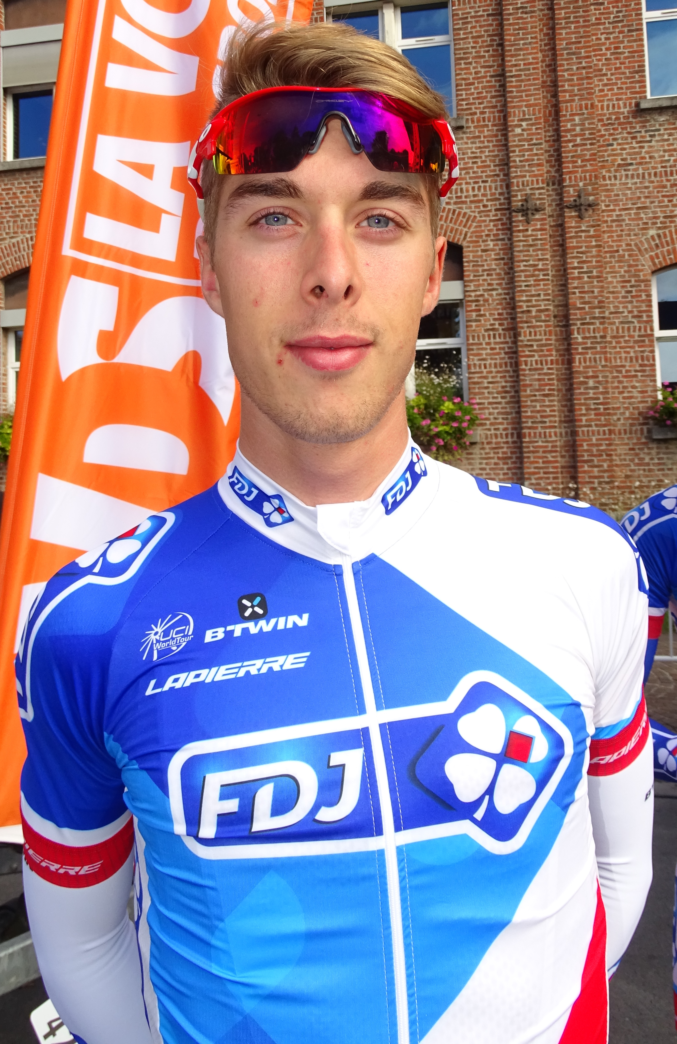 Reportage réalisé le dimanche 6 septembre à l'occasion du départ et de l'arrivée du Grand Prix de Fourmies 2015 à Fourmies, Nord-Pas-de-Calais, France.